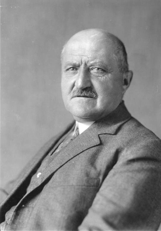 Georg Michaelis Der ehemalige Reichskanzler Wirkl. Geh. Rat Dr. Georg Michaelis, feiert am 8. September 1932 seinen 75. Geburtstag. Exzellenz Michaelis war seit 1879 im Staatsdienst. Er war Oberpräsident in Breslau, später Unterstaatssekretär im Finanzministerium, dann Reichsminister für Volksernährung und übernahm im Kriege das Reichskanzleramt. Zuletzt war er Oberpräsident von Pommern. [Porträt Dr. Georg Michaelis] Abgebildete Personen: Michaelis, Georg: Reichskanzler, Ministerpräsident von Preußen, Deutschland